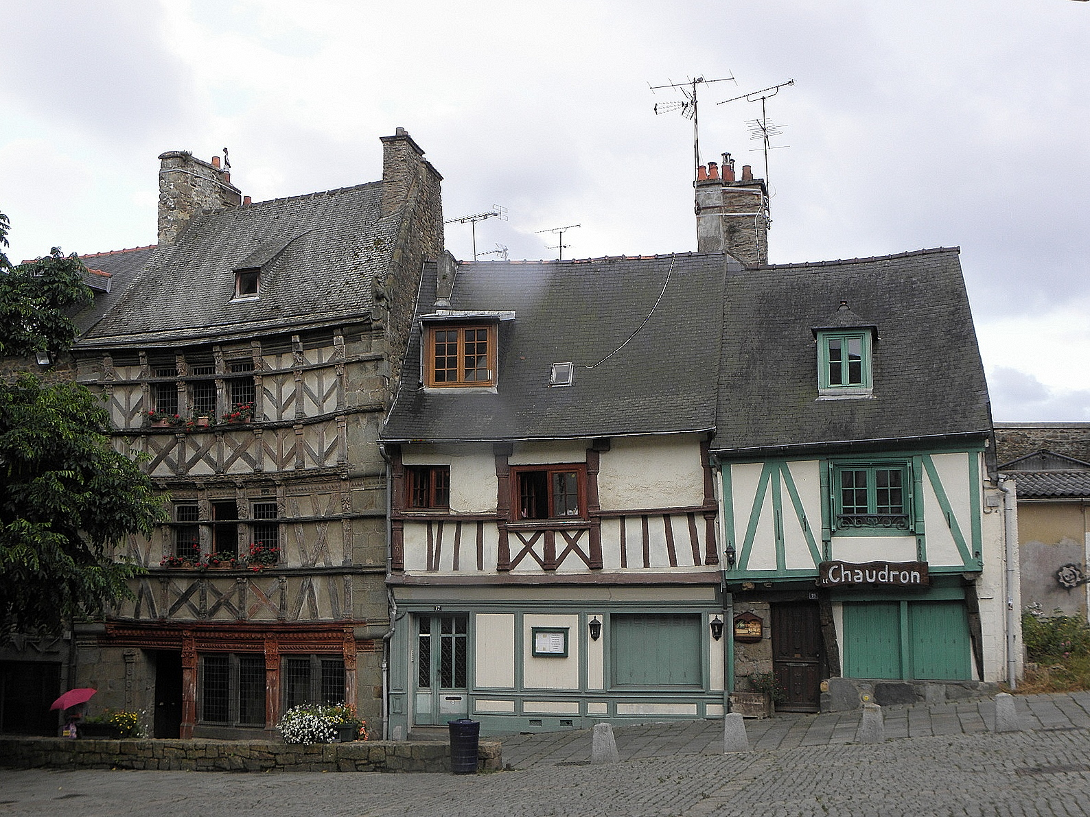 Maisons sise 15, 17 et 19 rue Fardel à Saint-Brieuc (22).